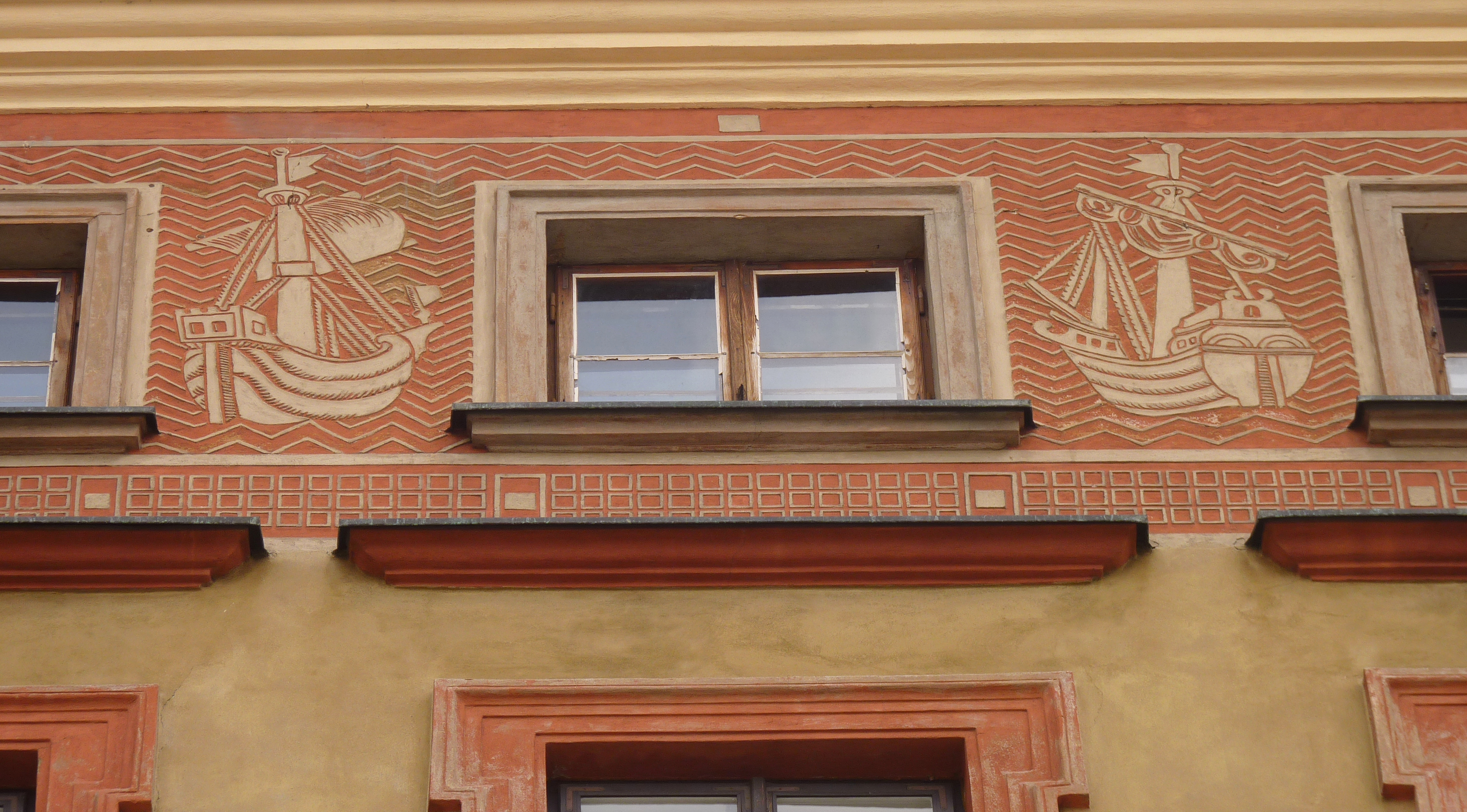 Warszawa, kamienica. Sgraffito autorstwa Heleny i Lecha Grześkiewiczów, Marii i Bohdana Urbanowiczów.